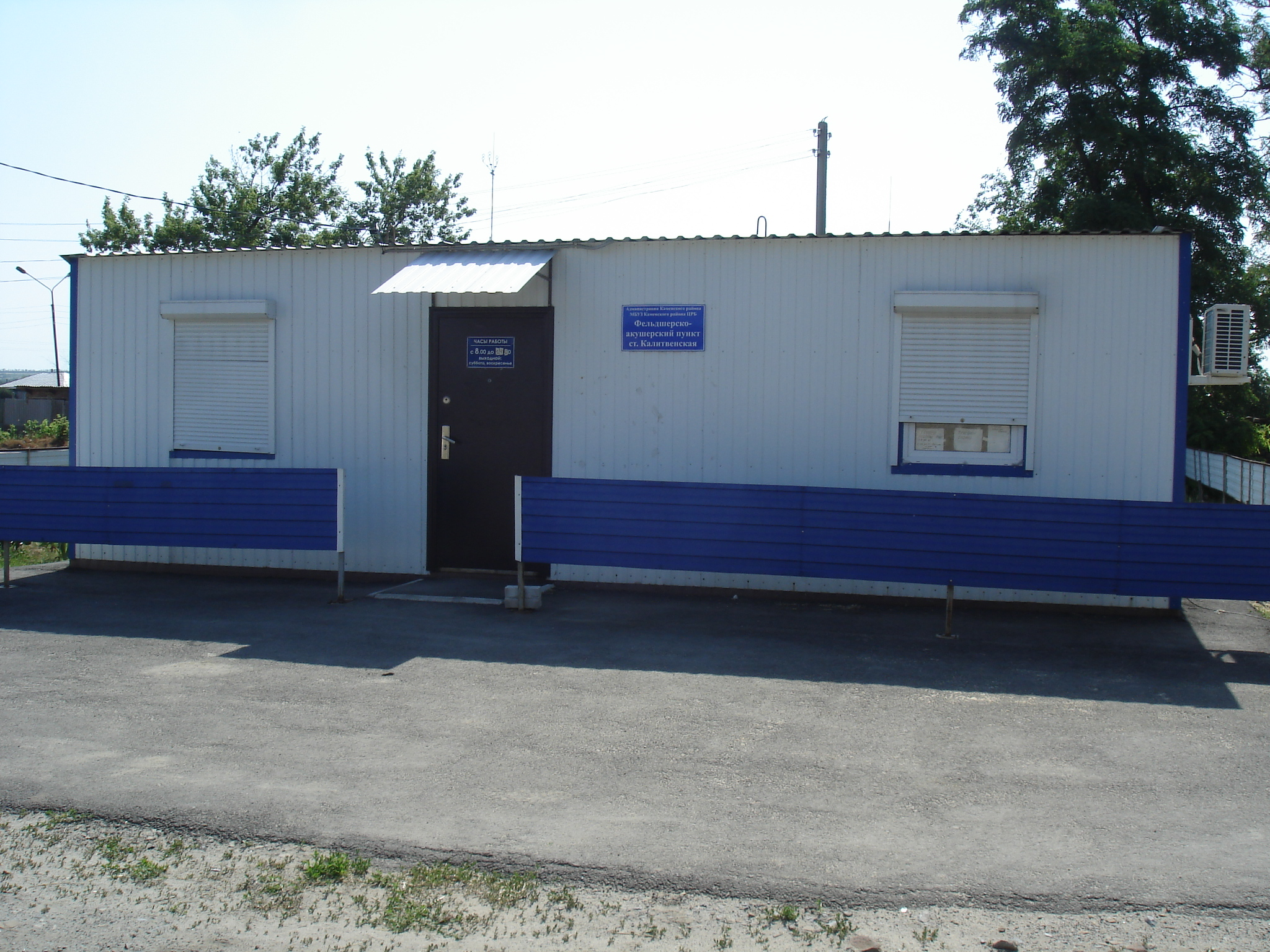 Станица Калитвенская - ФАП